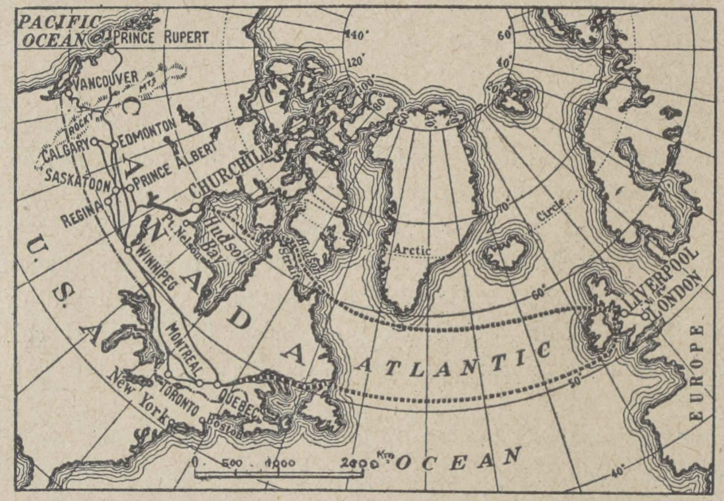 carte Chemin de fer de la Baie d'Hudson Fig 1